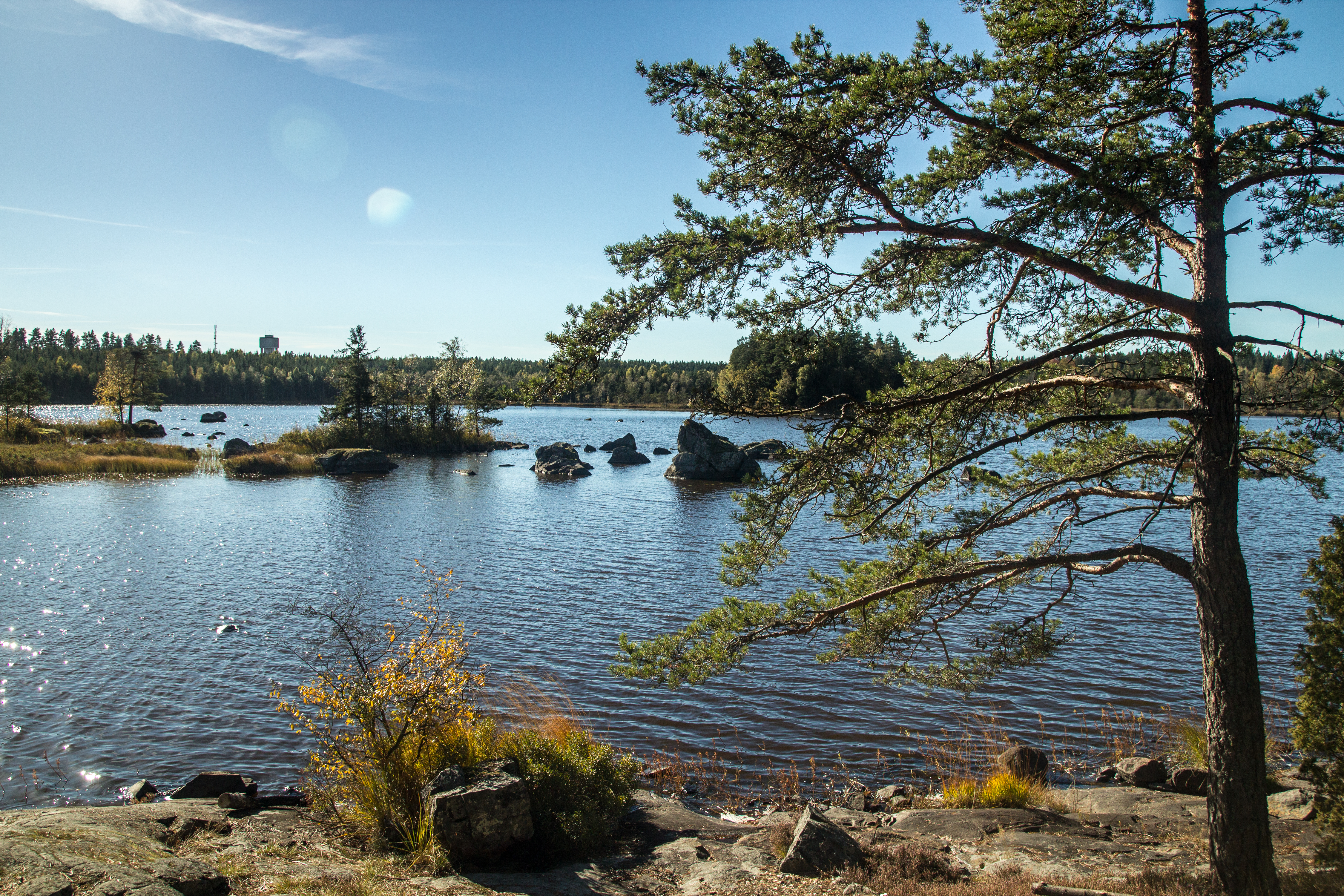 Grimmansmålasjön